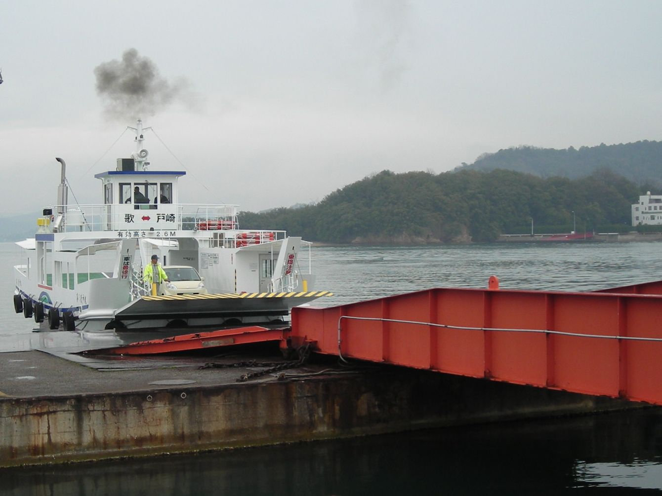 画像